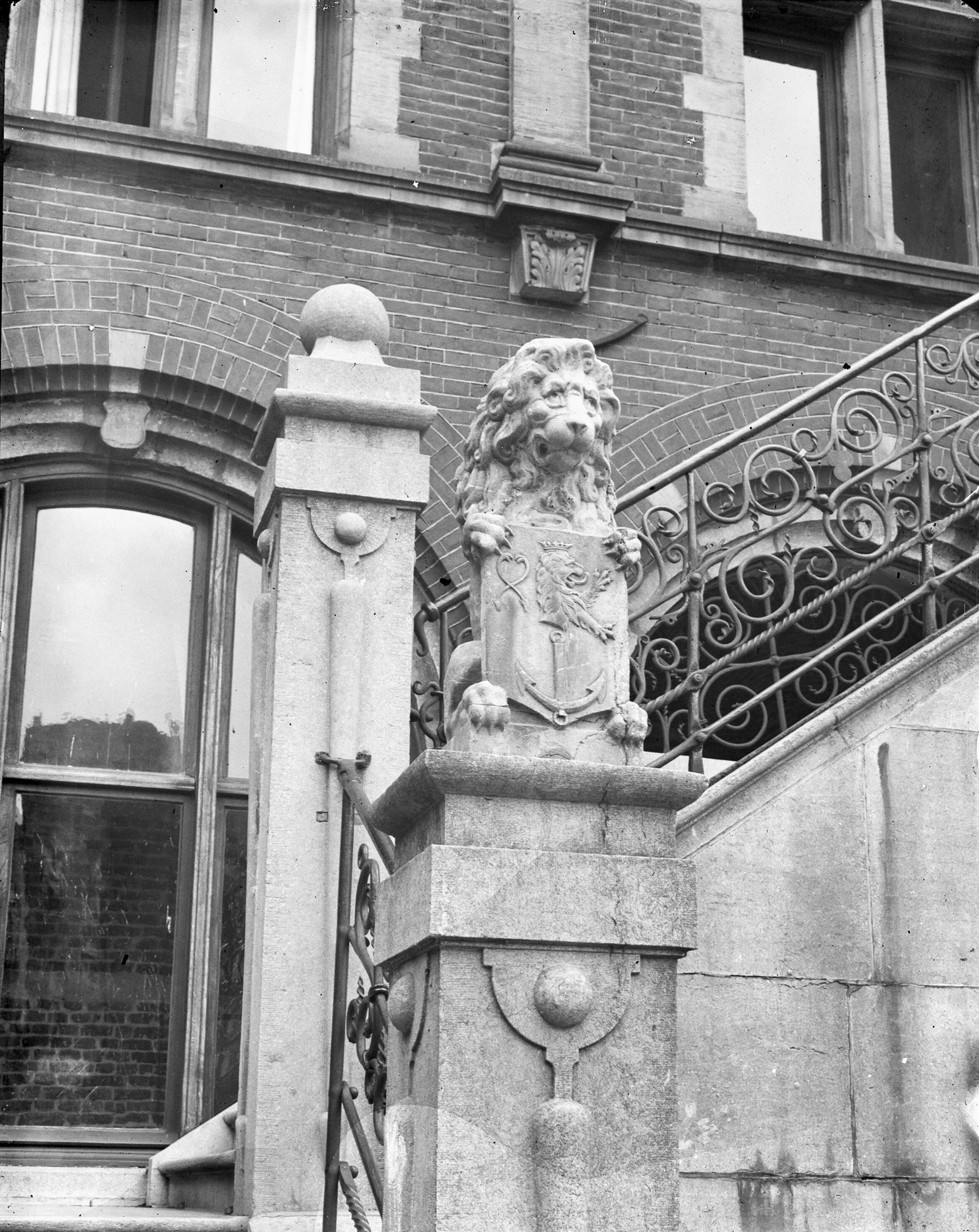 Raadhuis: leeuwtje bordes